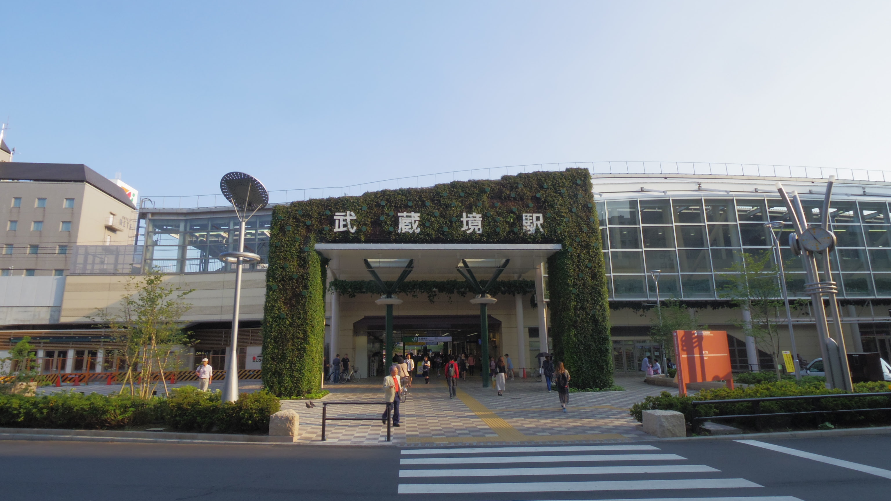 JR武蔵境駅北口駅舎（2016年5月22日撮影）